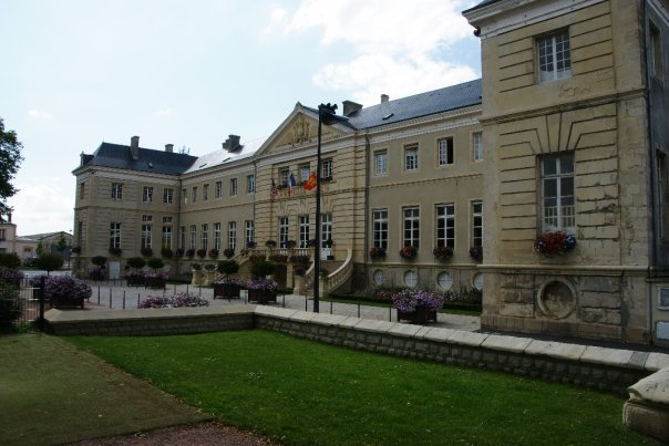 Façade de l'Hôtel de ville d'Isigny-sur-Mer prise en Juillet 2009.